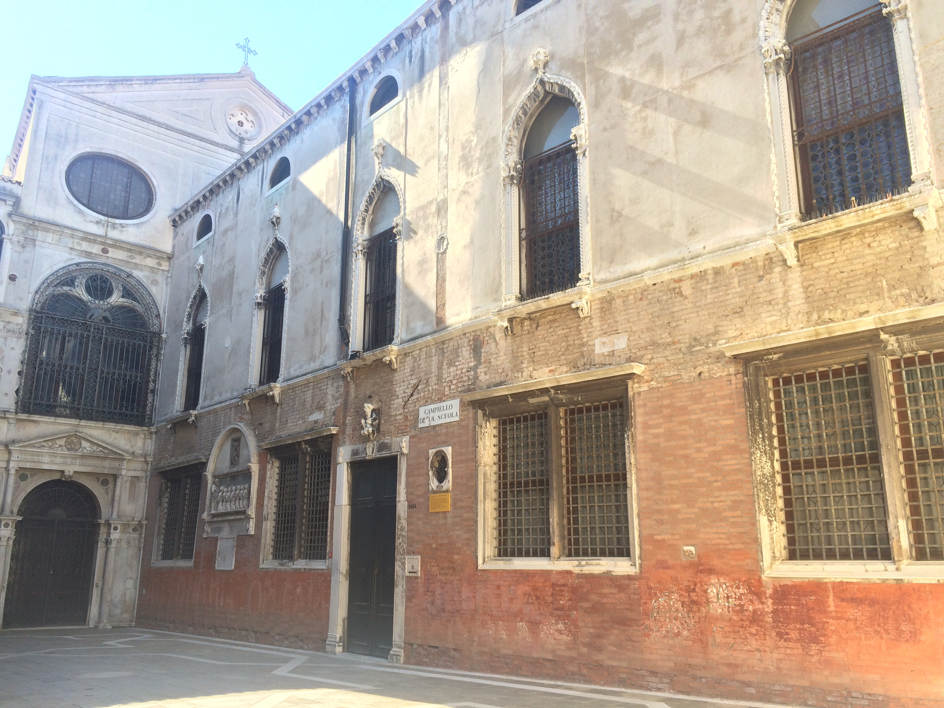 Venezia: scorcio della Scuola Grande di San Giovanni Evangelista.